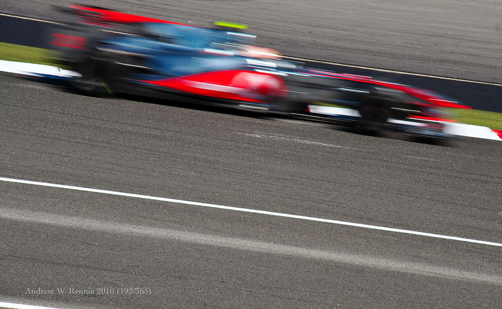 Lewis Hamilton à Silverstone en 2010